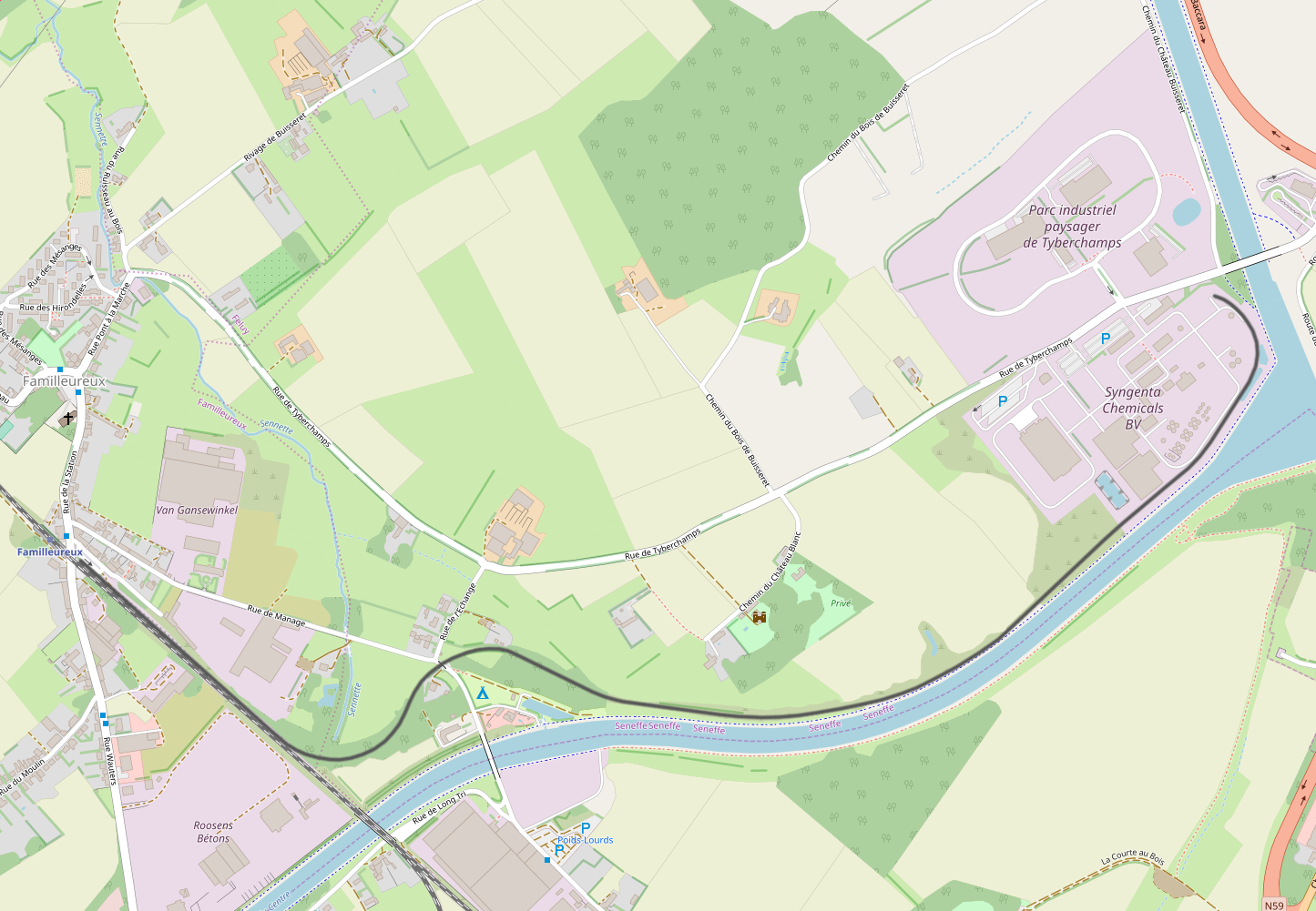 Belgian Railway Line 276, Familleureux - Seneffe Zoning